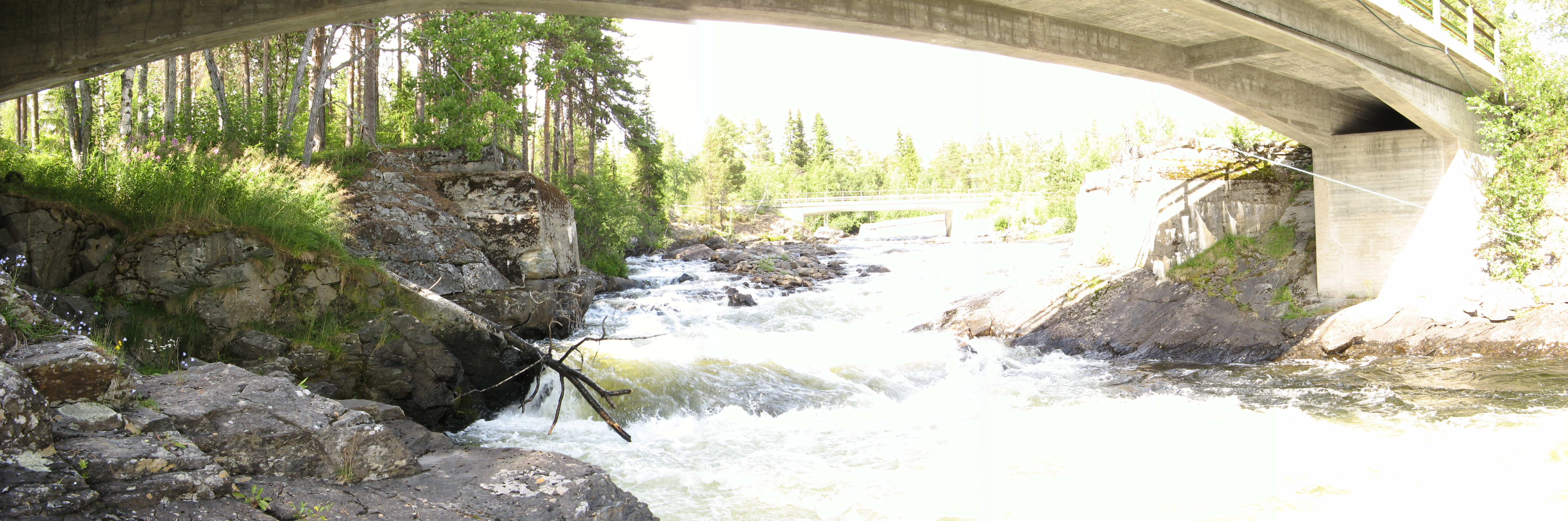 Girjesåns utlopp till Umeälven under den nedre bron i Slussfors.